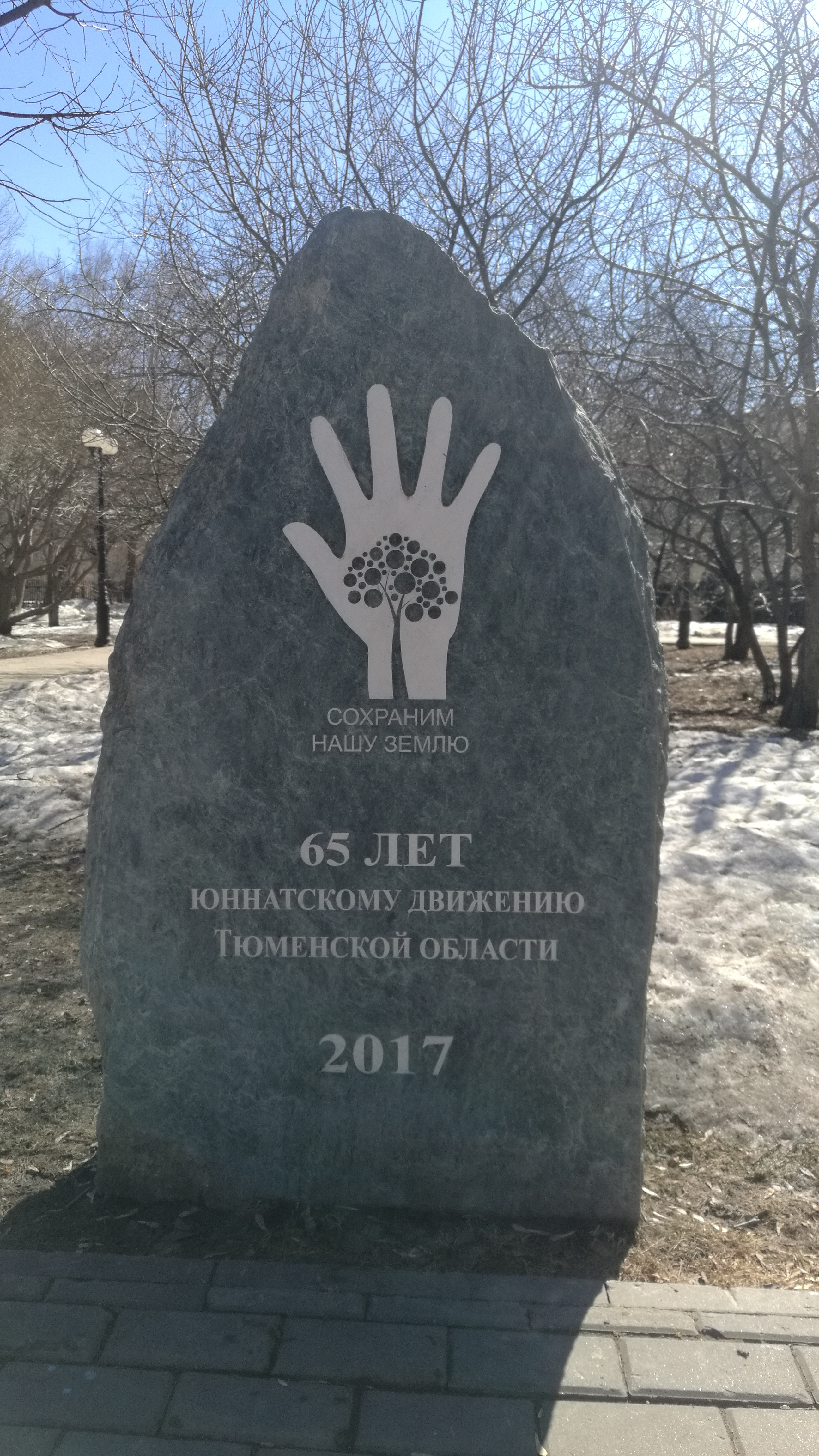 Memorŝtono pri la 65-a datreveno de la movado de la junaj naturalistoj en Tjumena provinco. Skvaro de Junnatoj, Tjumeno, Rusio.